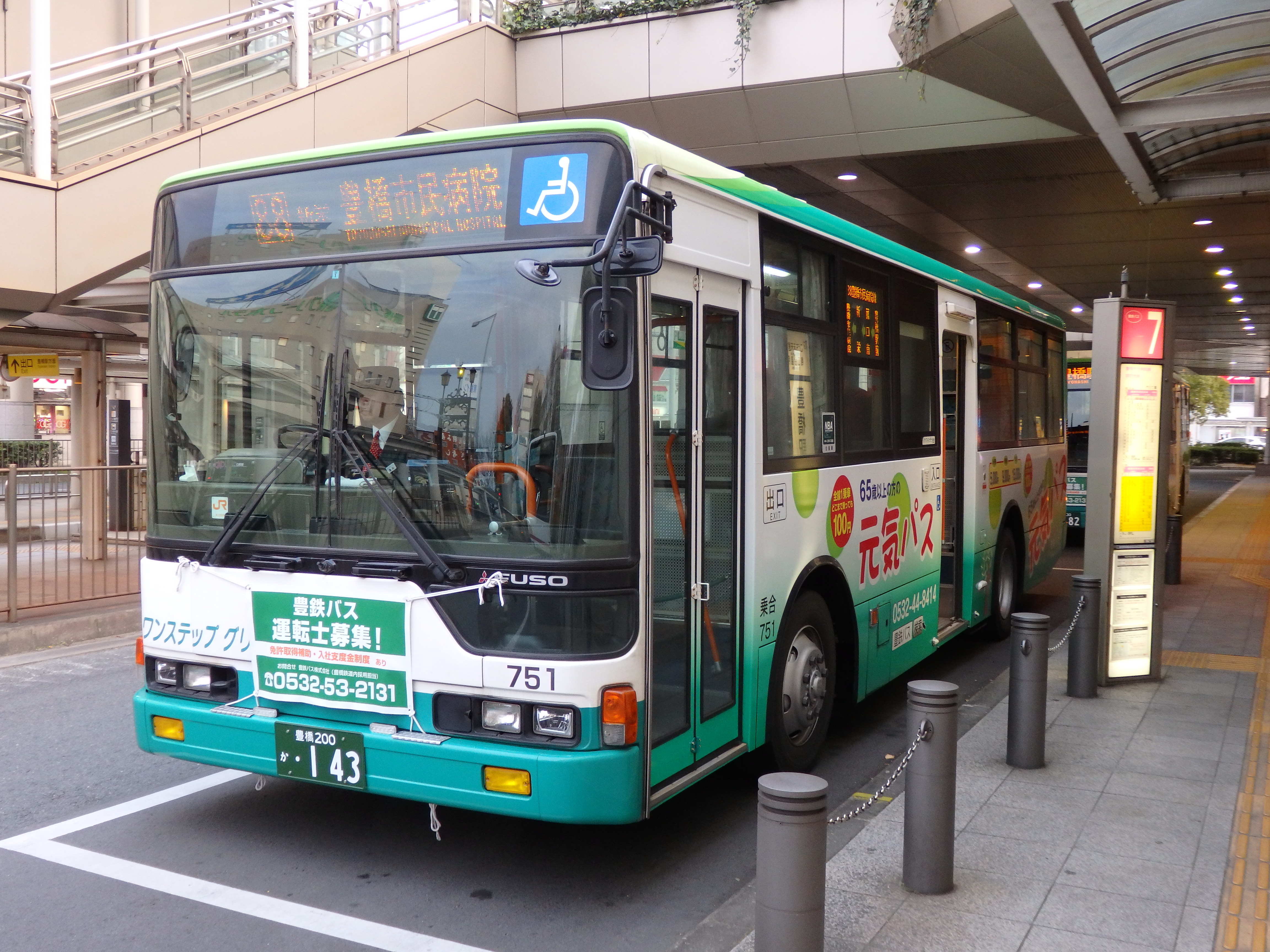 豊鉄バス豊橋営業所所管豊橋市民病院線